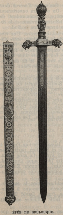 Epée de Soulouque